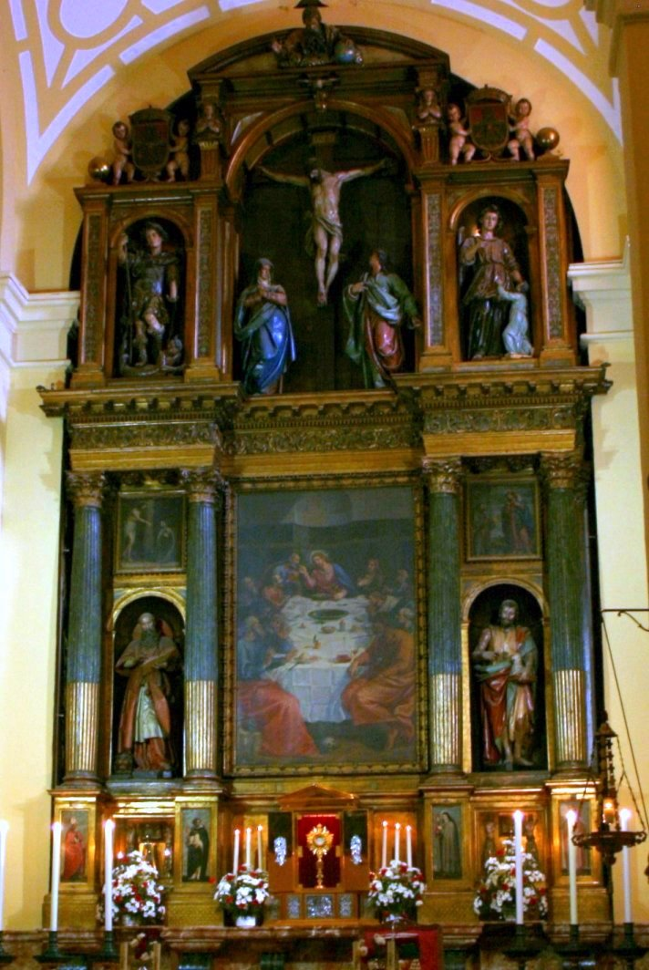 Retablo mayor de la iglesia del convento de monjas jerónimas del Corpus Christi (Carboneras), Madrid, obra de Antón Mrales, terminado en 1622.